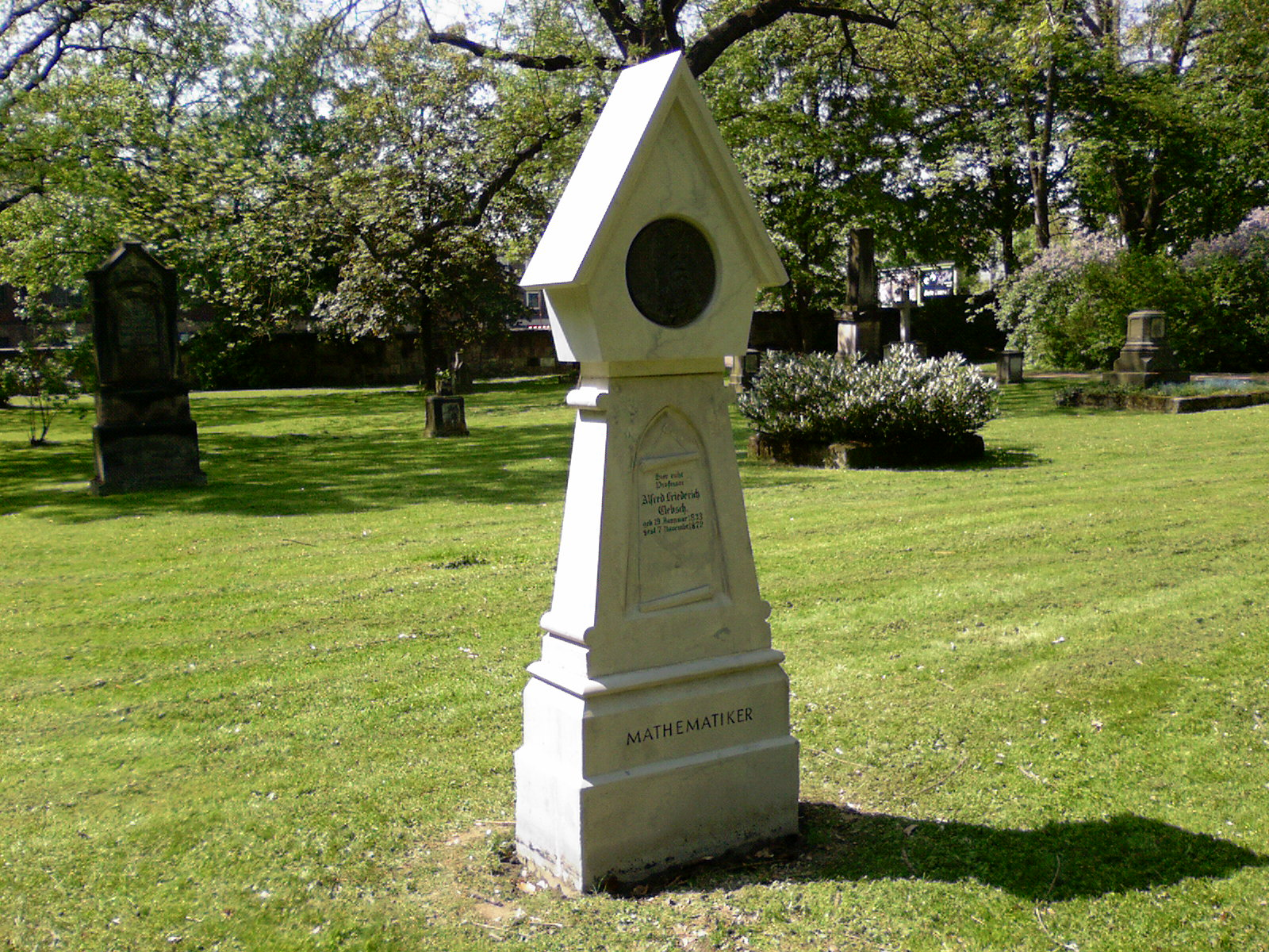 Grabmal von Alfred Clebsch, 2006 restauriert und ergänzt